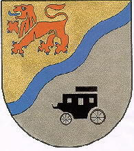 Wappen von Niedert